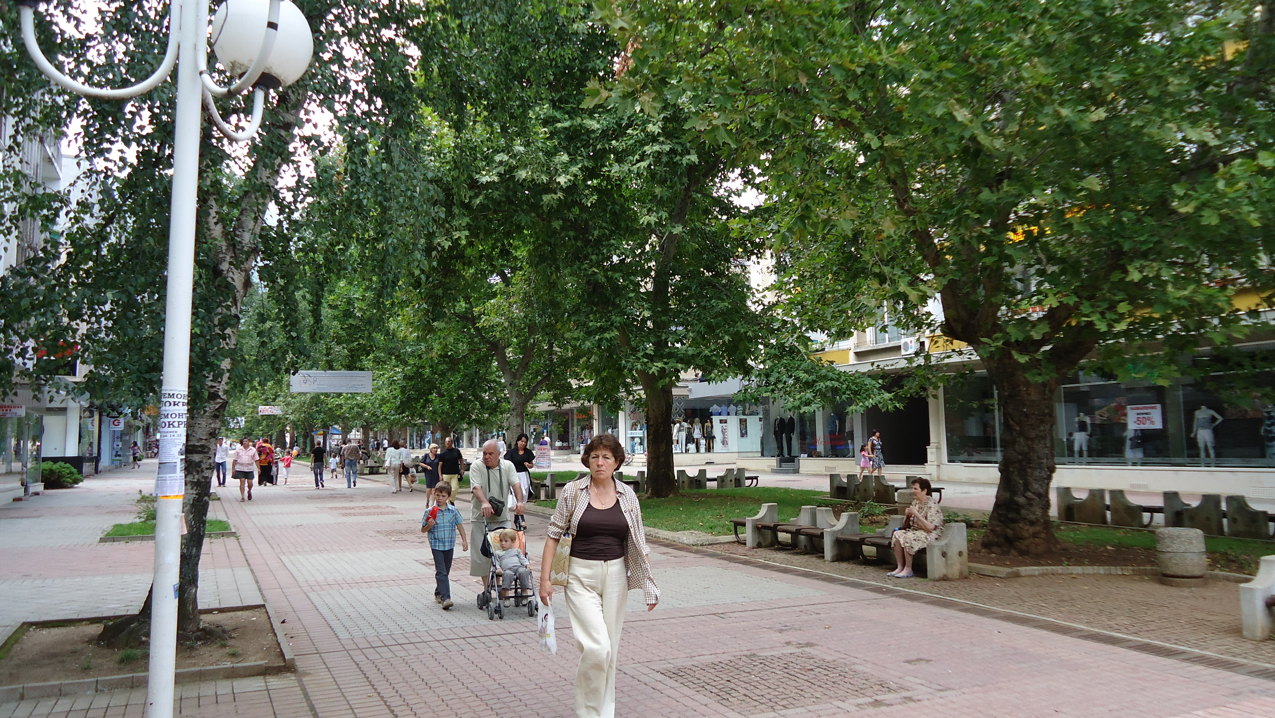 бул. "Никола Войводов" - първата обособена пешеходна улица в България, изградена през 70-те години